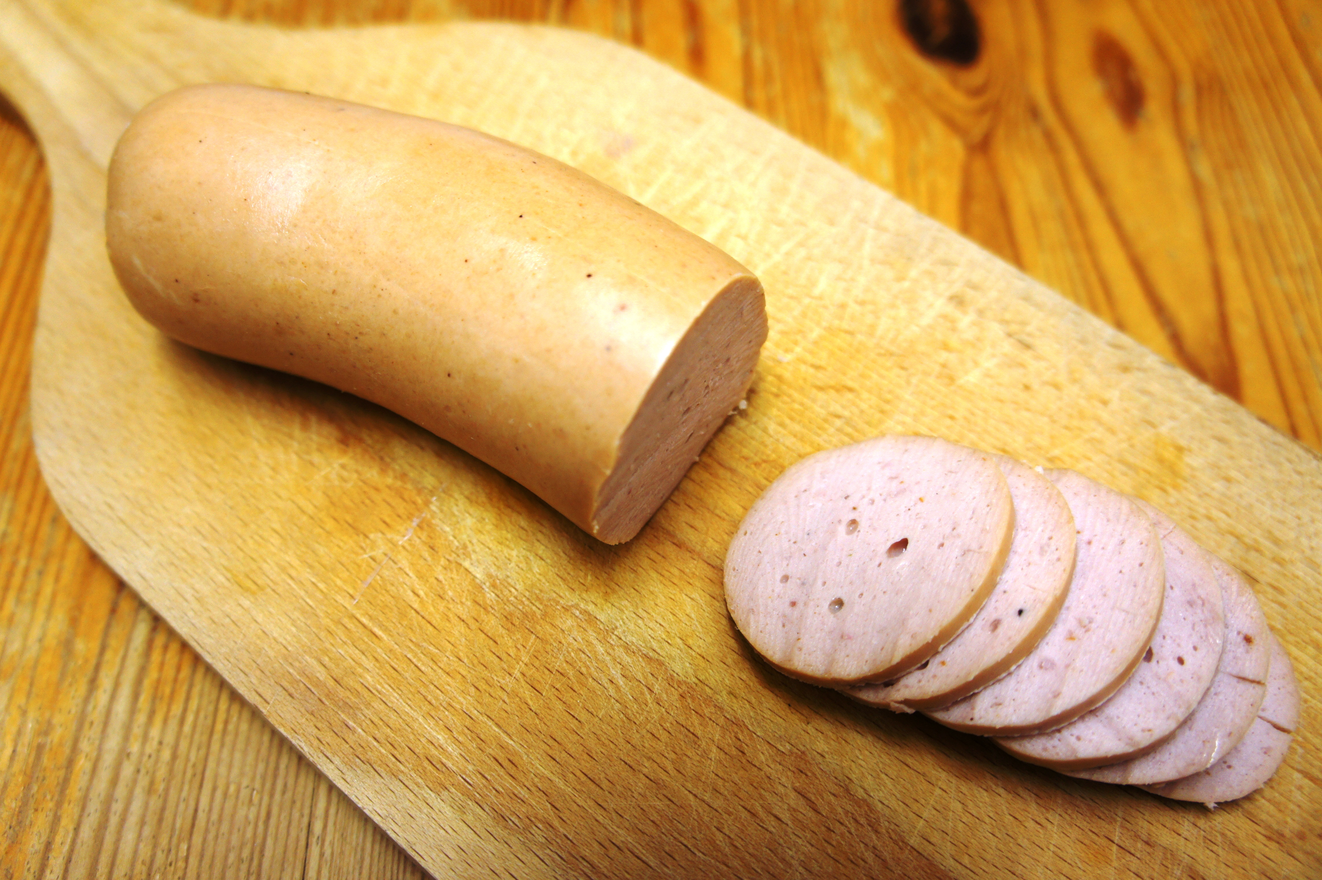 Ein roher Cervelat, dem die Haut entfernt wurde, angeschnitten auf einem Holzbrettchen.